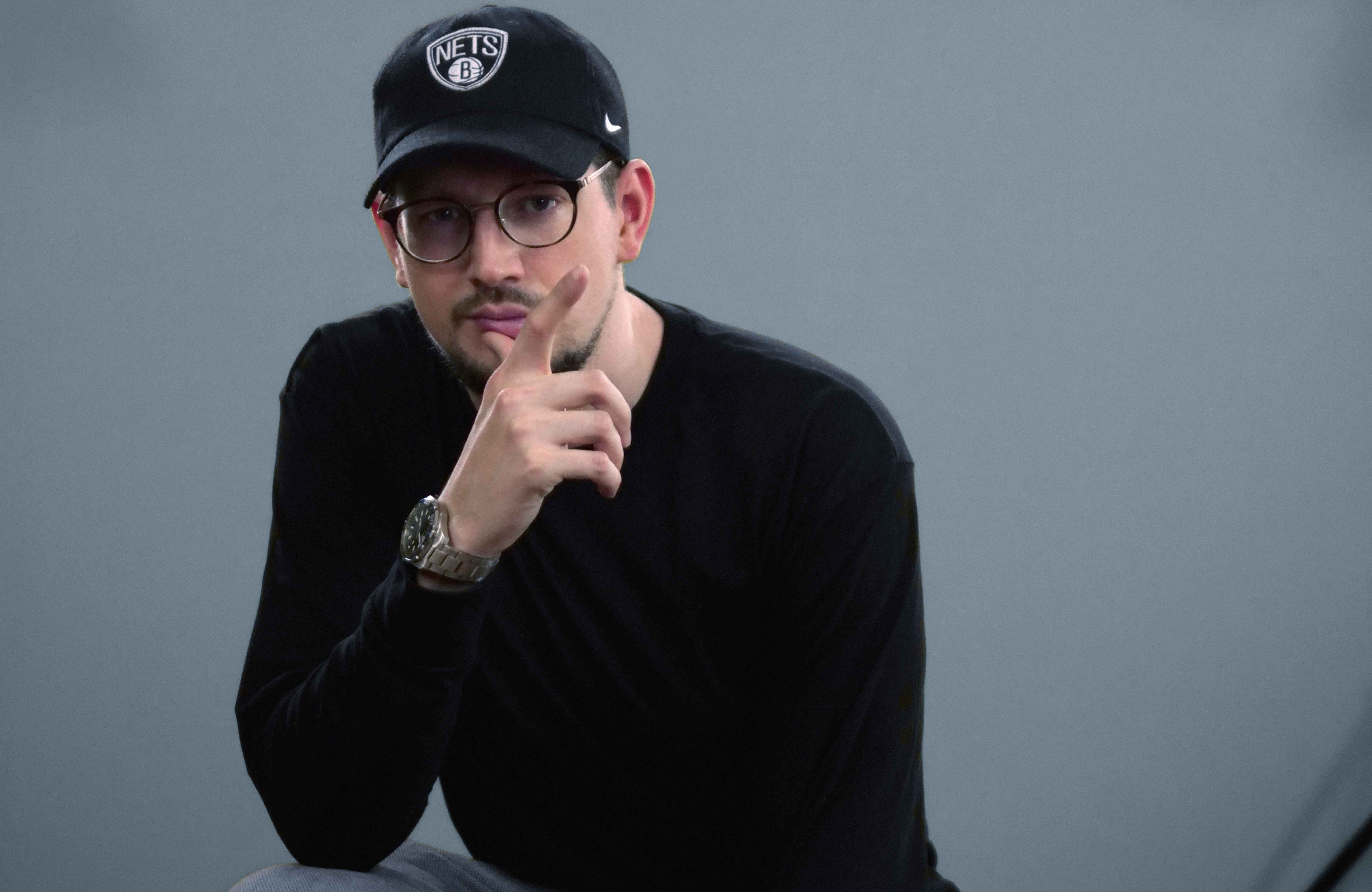 Pressefoto von J. S. Kuster